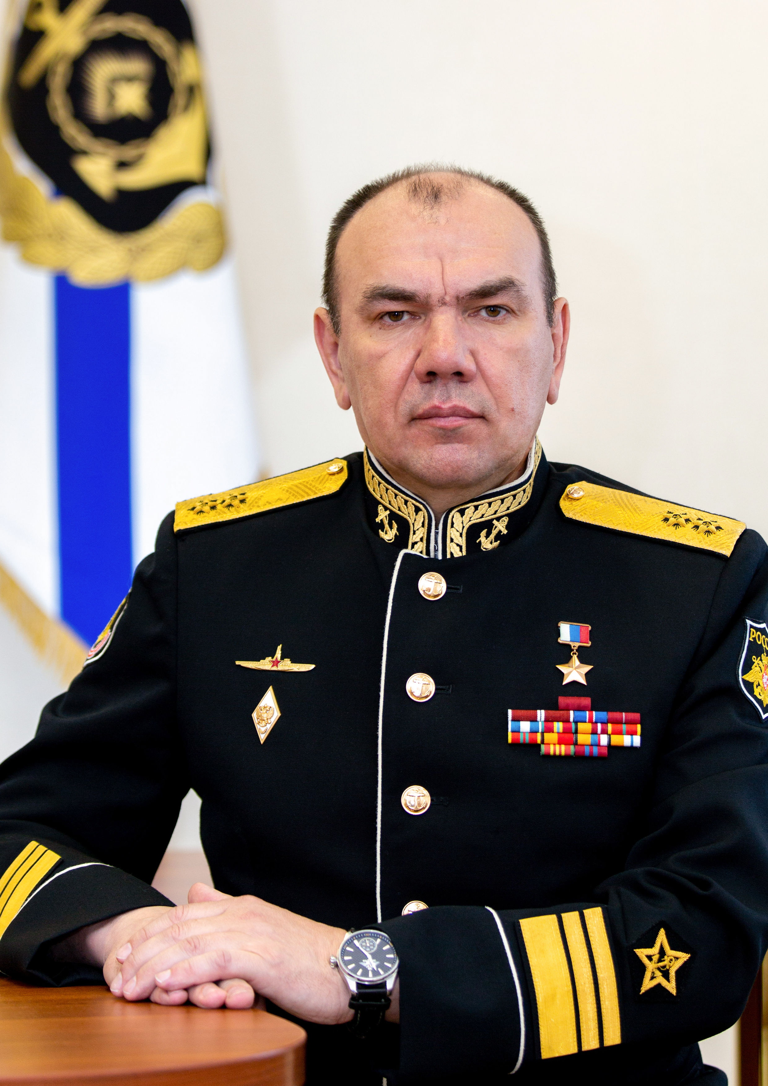 Командующий Северным флотом ВМФ России вице-адмирал Моисеев Александр Алексеевич. Герой Российской Федерации.